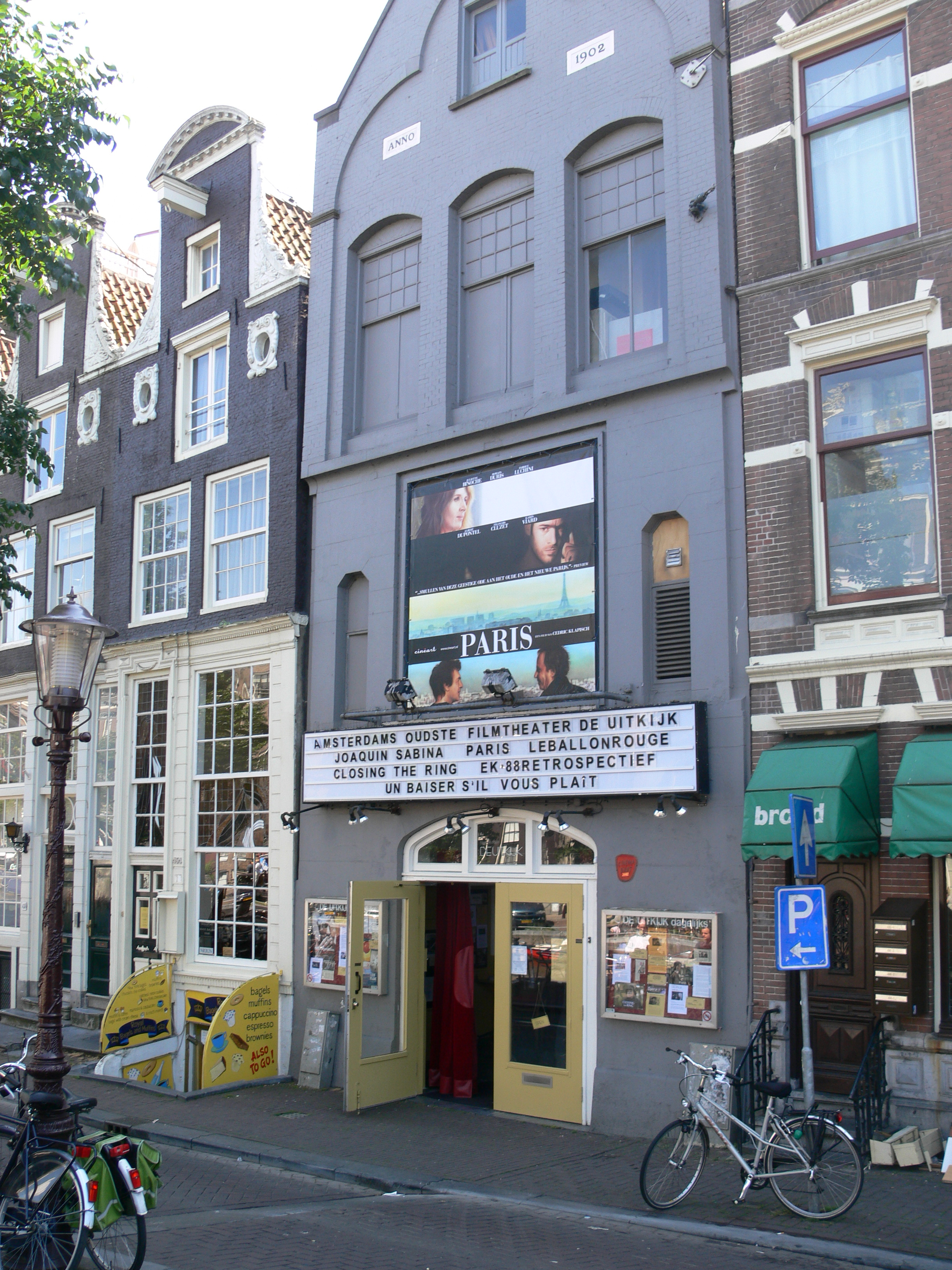 Cinema De Uitkijk', Prinsengracht 452, Amsterdam